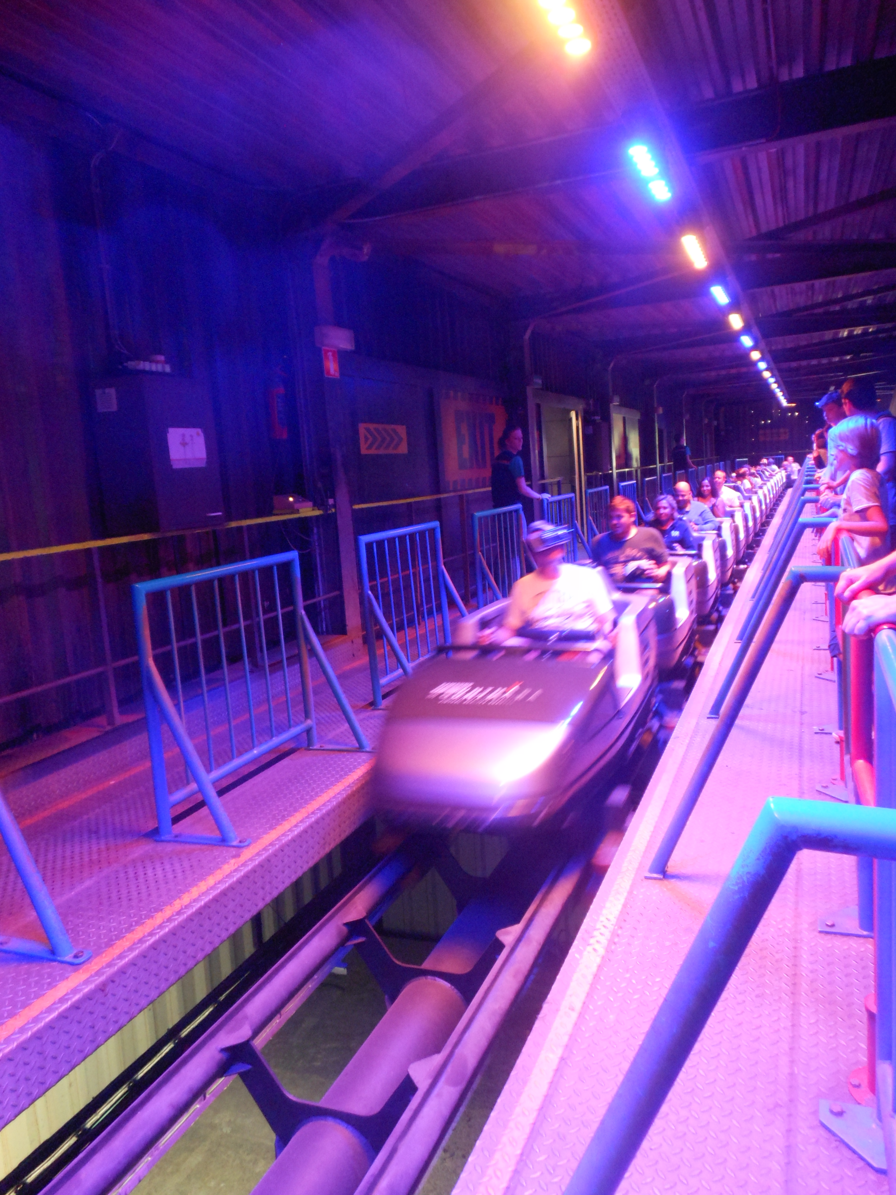 Het station van de attractie "Revolution" in Bobbejaanland, een achtbaan van het model "Illusion" van de Nederlandse achtbaanbouwer Vekoma. Sinds 2016 worden de eerste 15 wagons gebruikt voor "Mount Mara", een rit met Virtual Reality-brillen op een fictieve vulkaan die op uitbarsten staat.